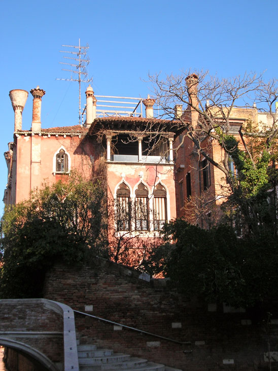 Retro di Ca' Dario a Venezia.